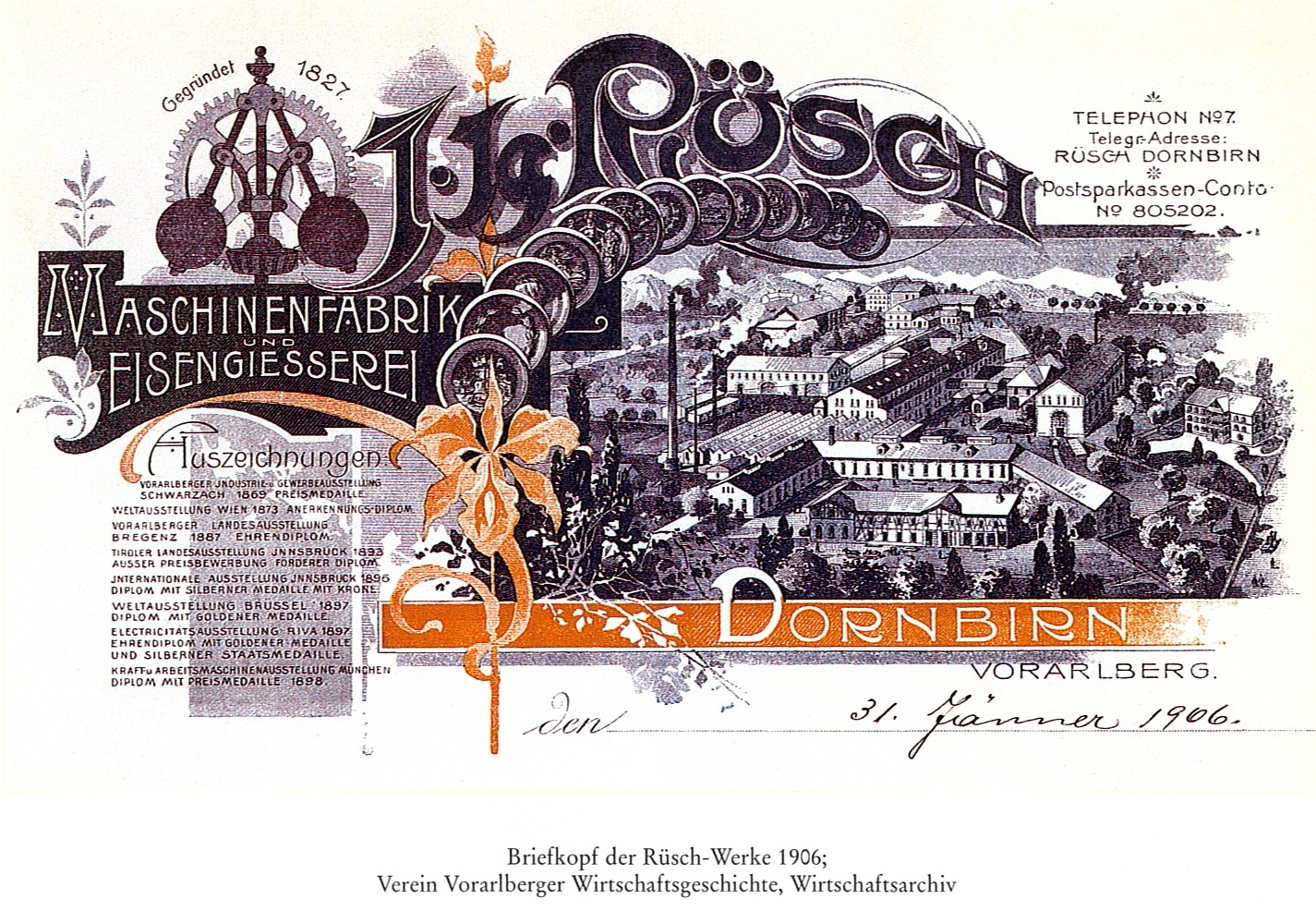 Briefkopf von 1906 der “Rüsch-Werke 1827-1984” in Dornbirn heutige Inatura